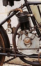 Ormonde Kelecom-Antoine engine 1902